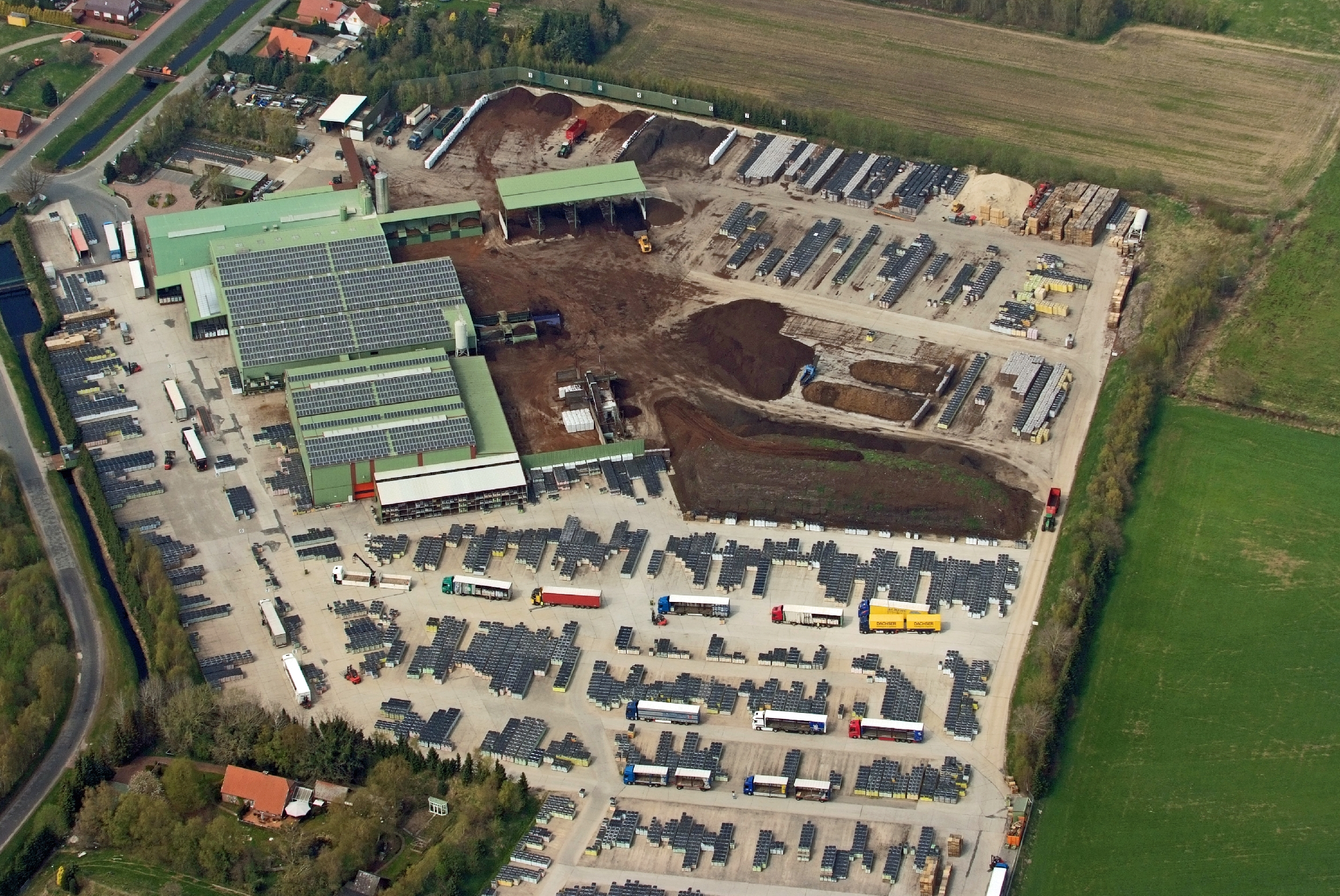 Erden- und Kompostwerk Heinrich Strenge, Ostrhauderfehn / Fotoflug von Nordholz-Spieka nach Oldenburg und Papenburg